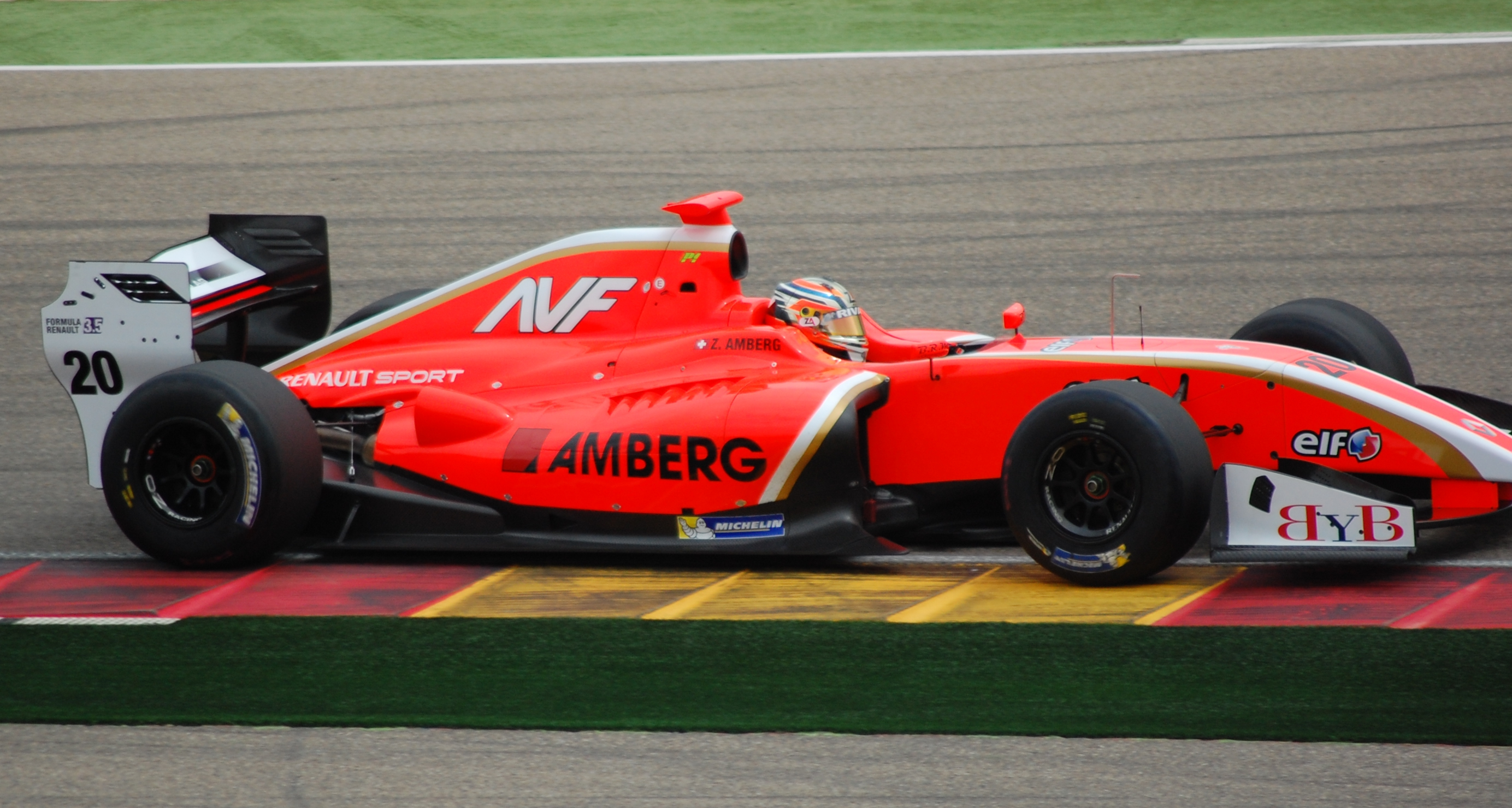 Aragonés: Zoel Amberg Motorland 2014